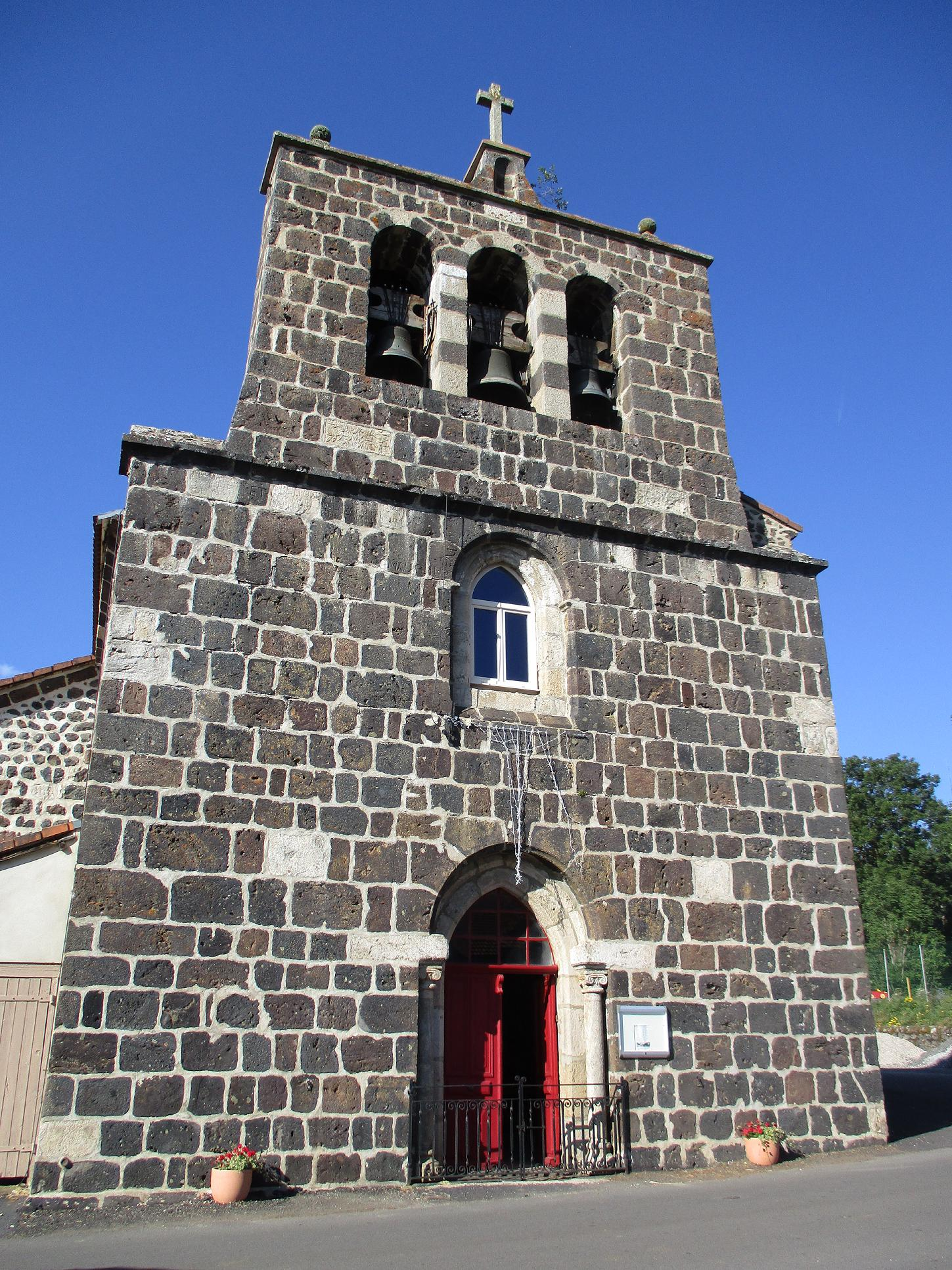 photo de la facade de l'église d'Alleyrac